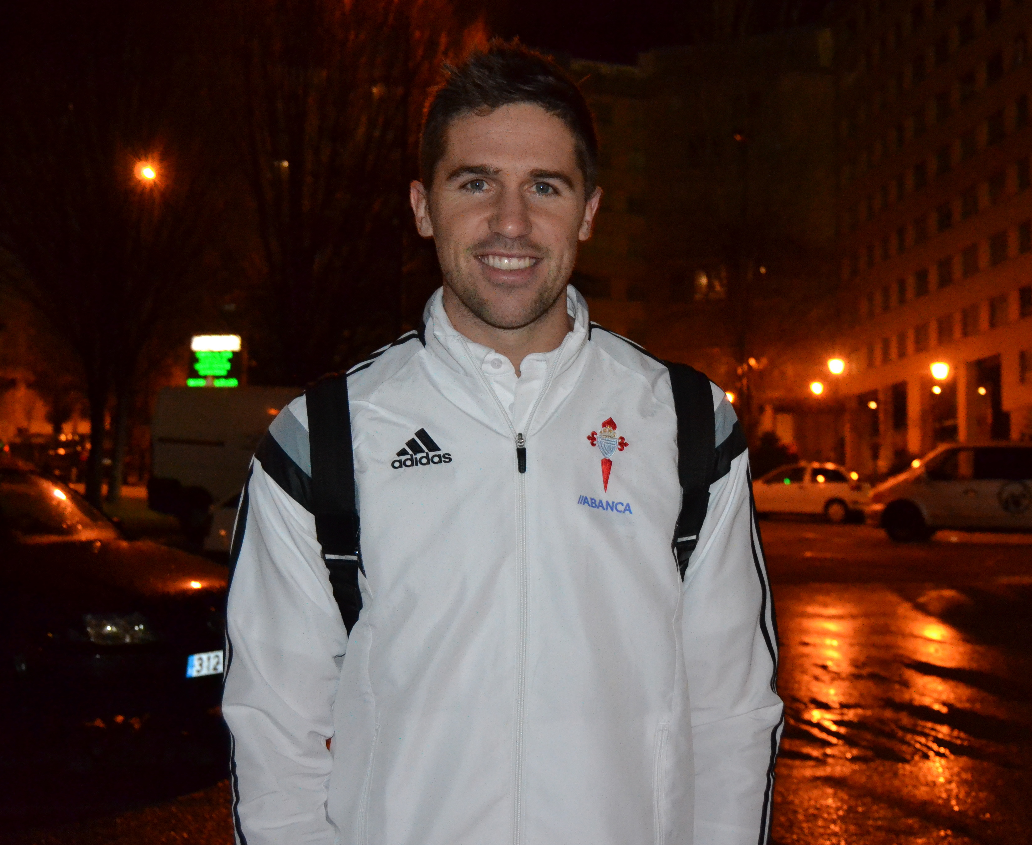 O futbolista Andreu Fontàs